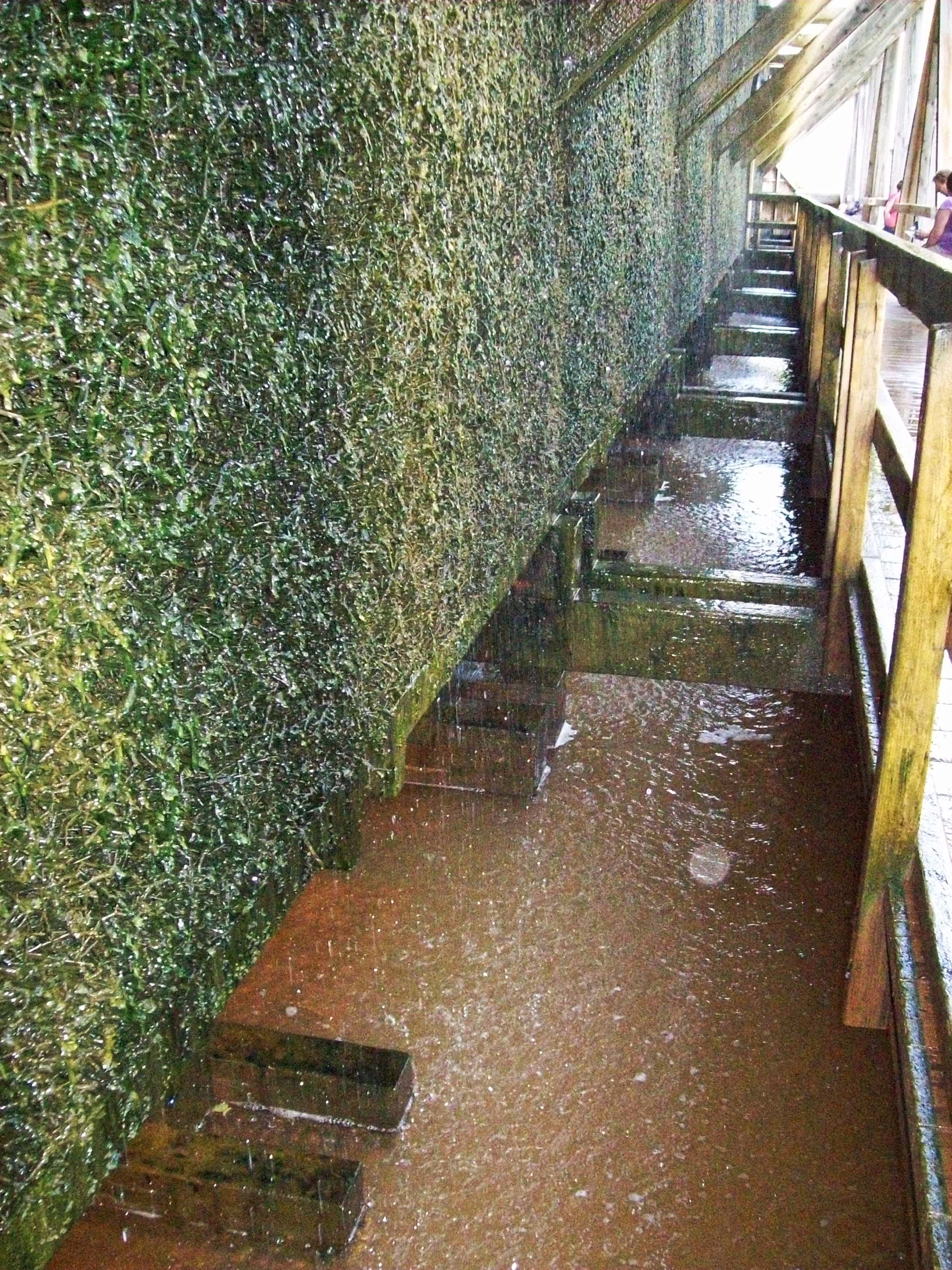 Der Gradier vorgang